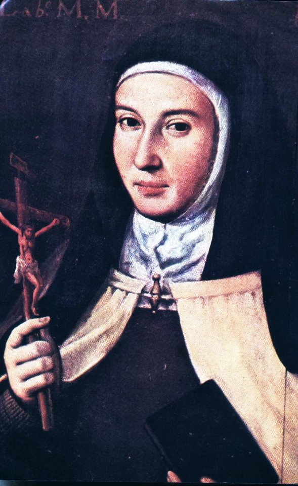 Cuadro de María de San José (Salazar) monja carmelita descalza, escritora mística e hija predilecta de Santa Teresa.